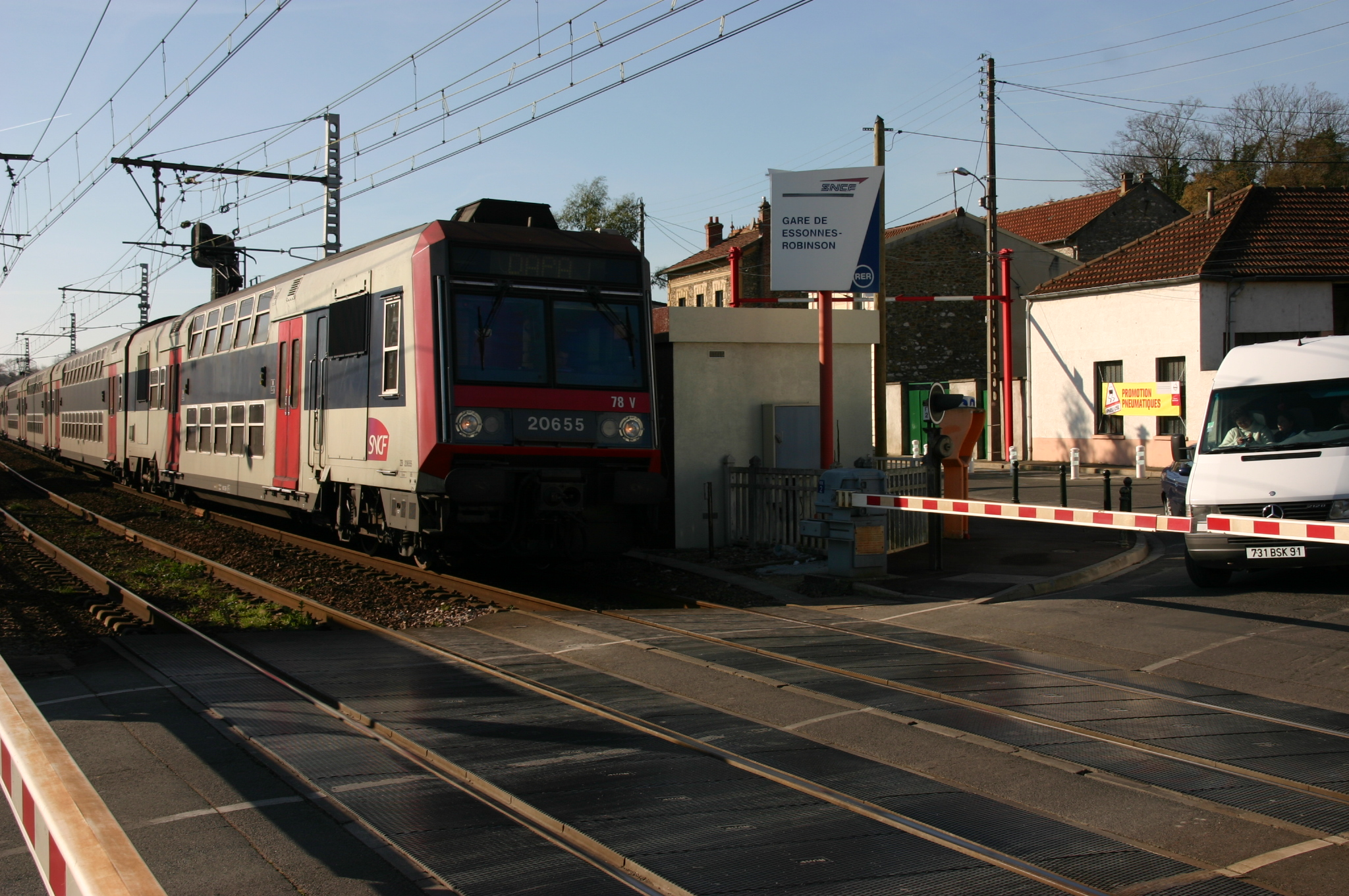 La gare d'Essonnes-Robinson, Corbeil-Essonnes, département de l'Essonne (France)